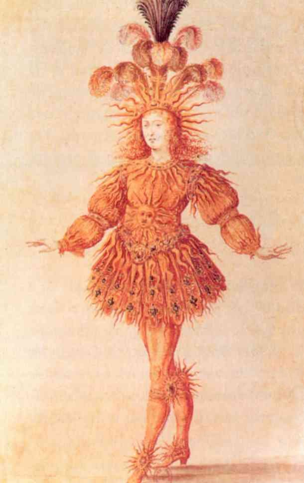 Gravure XVIIe